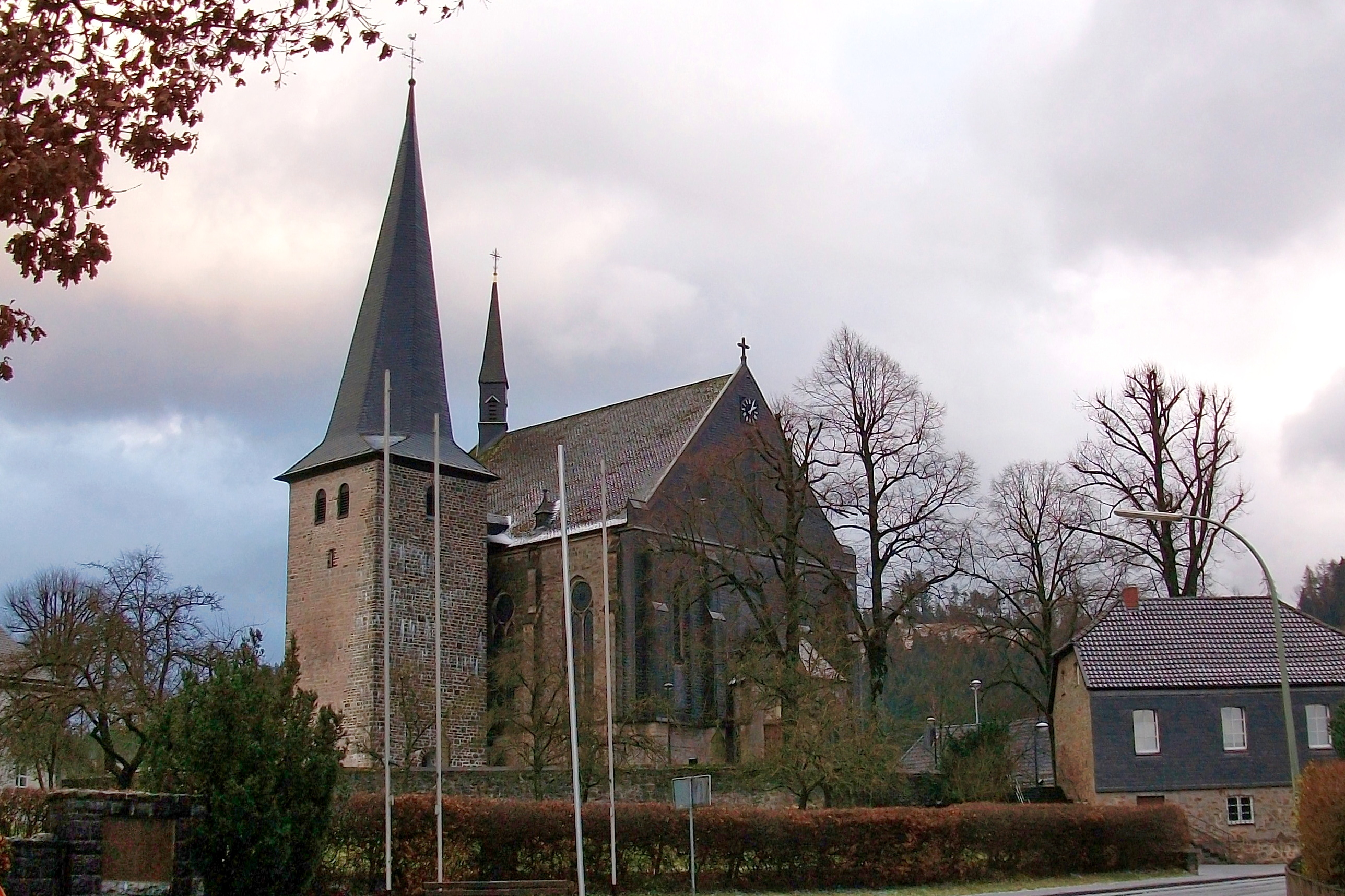 Sundern-Hellefeld, St. Martinus Kirche